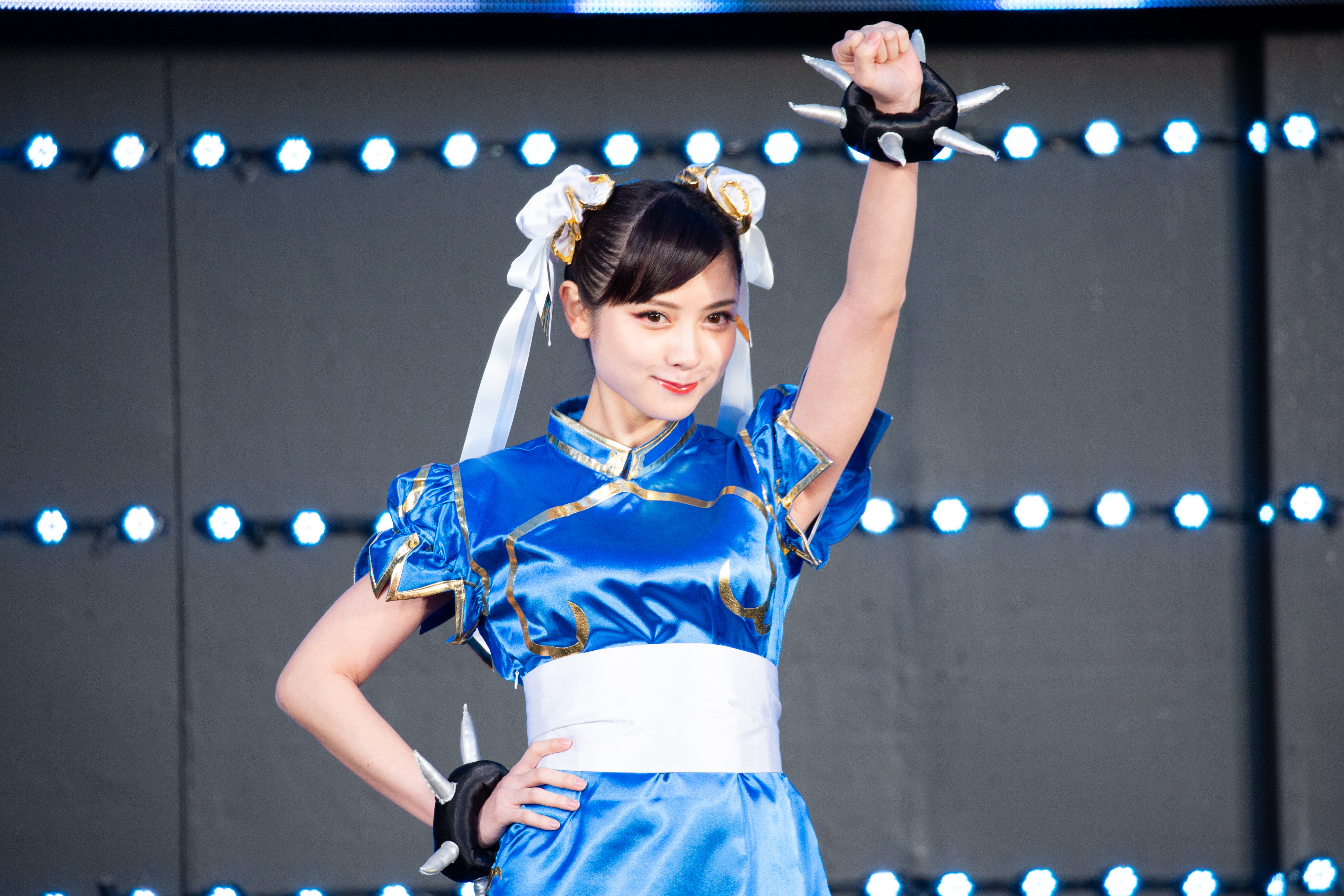 レディ・プレイヤー1 ジャパン・プレミア レッドカーペット 桃月なしこ